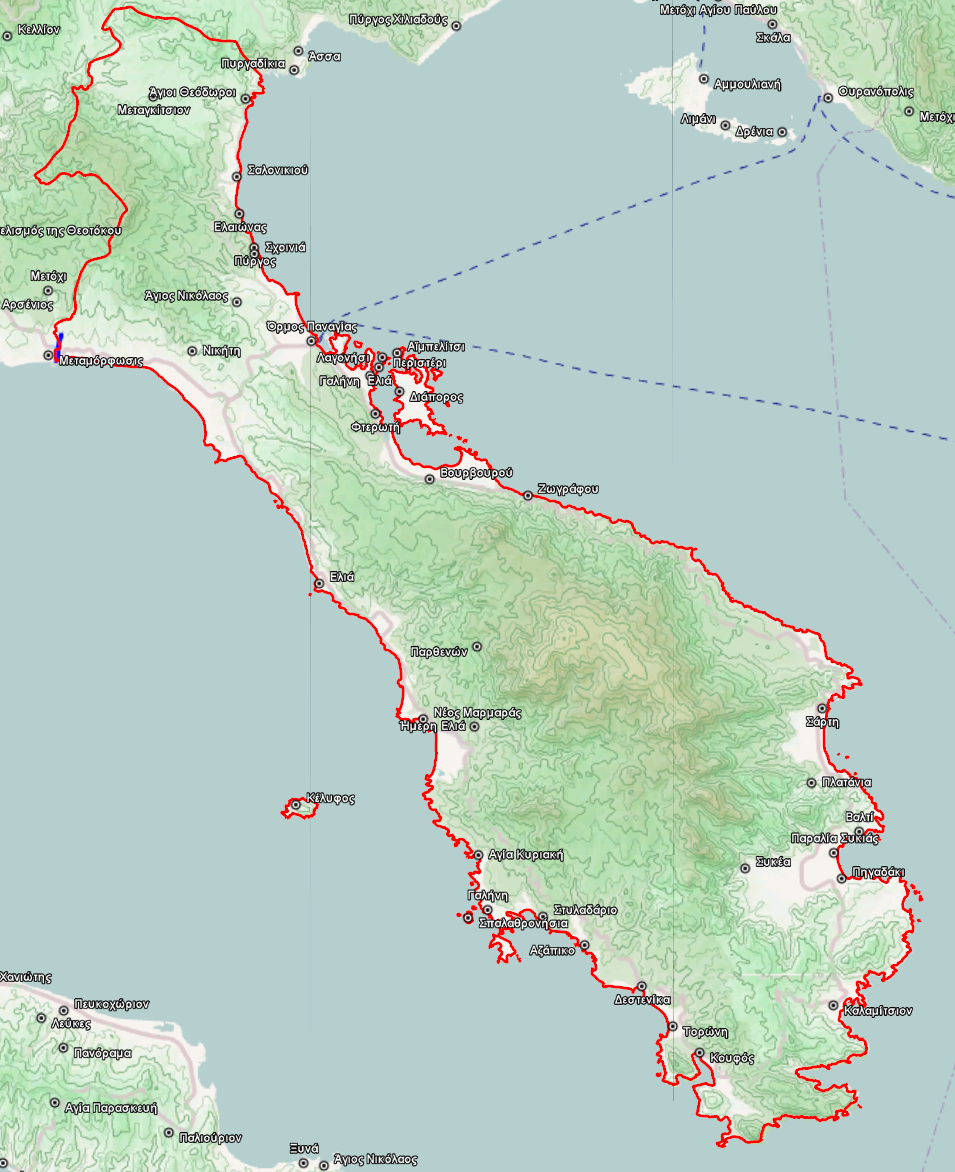 Τοπογραφικός χάρτης του Δήμου Σιθωνίας